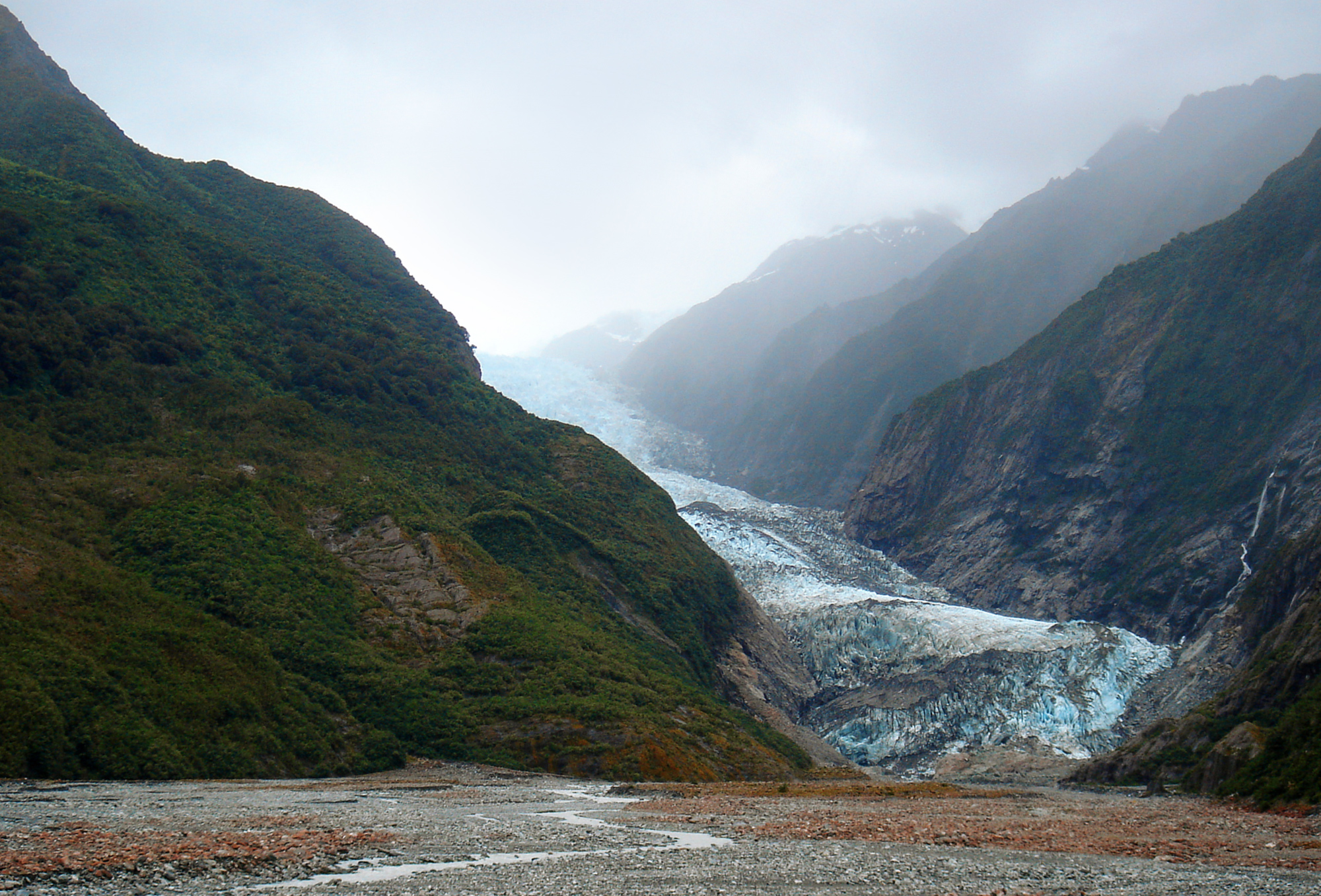 "Franz-Josef-Gletscher" op der Südinsel vu Neiséiland – Januar 2005